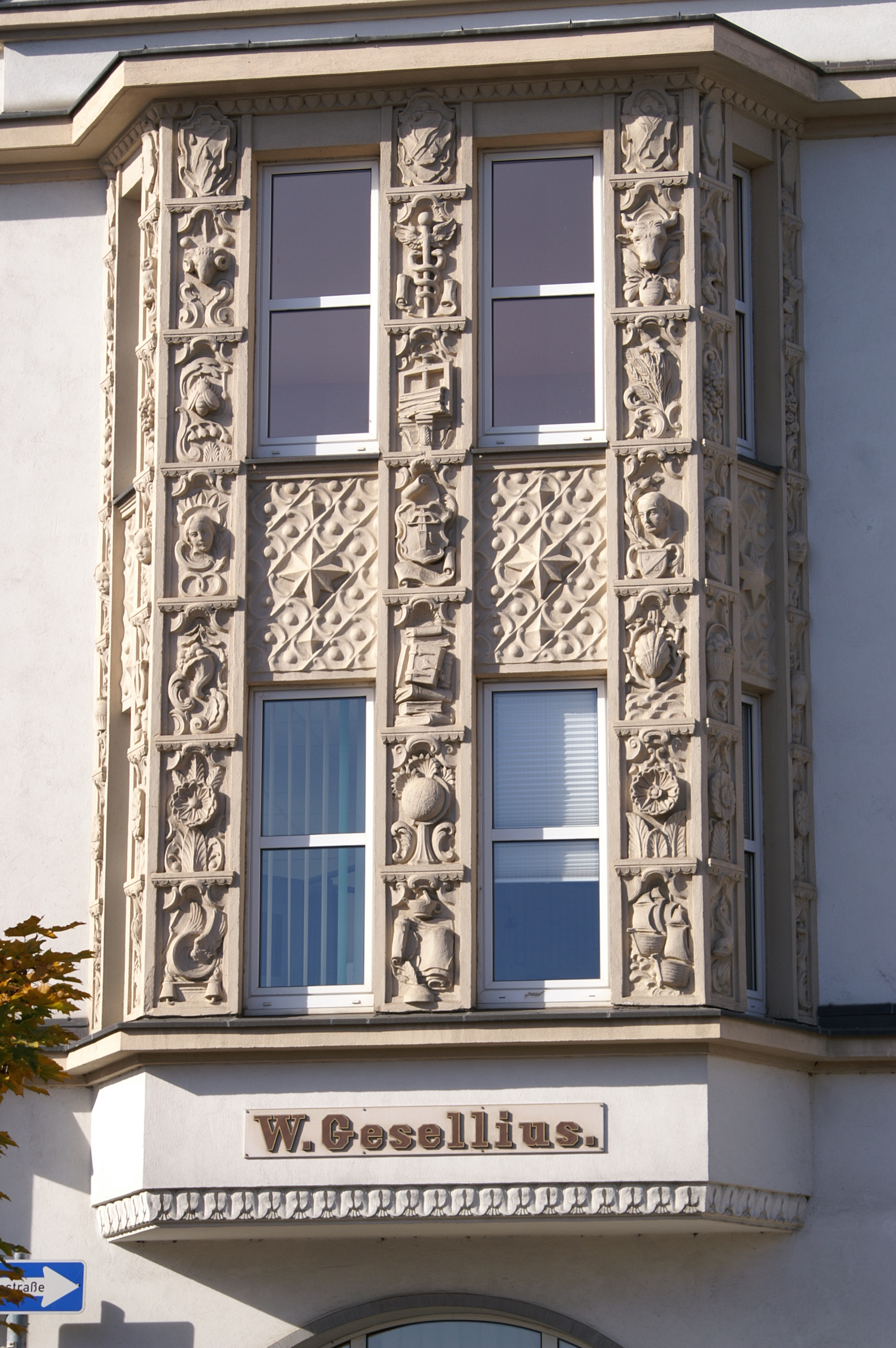 Demmin, Gesellushaus, Details